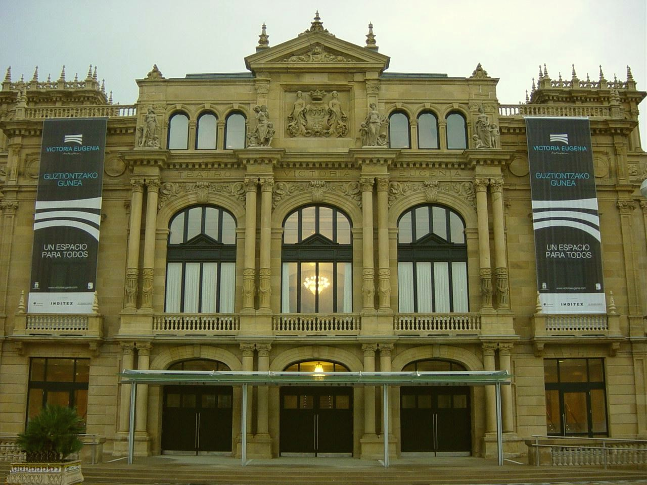 Fachada principal del Teatro Victoria Eugenia, en San Sebastián (España)